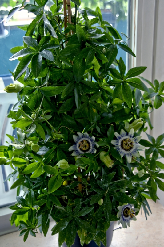 Passiflora, die vielen Triebe zu einem Busch gewickelt, mit Blüten